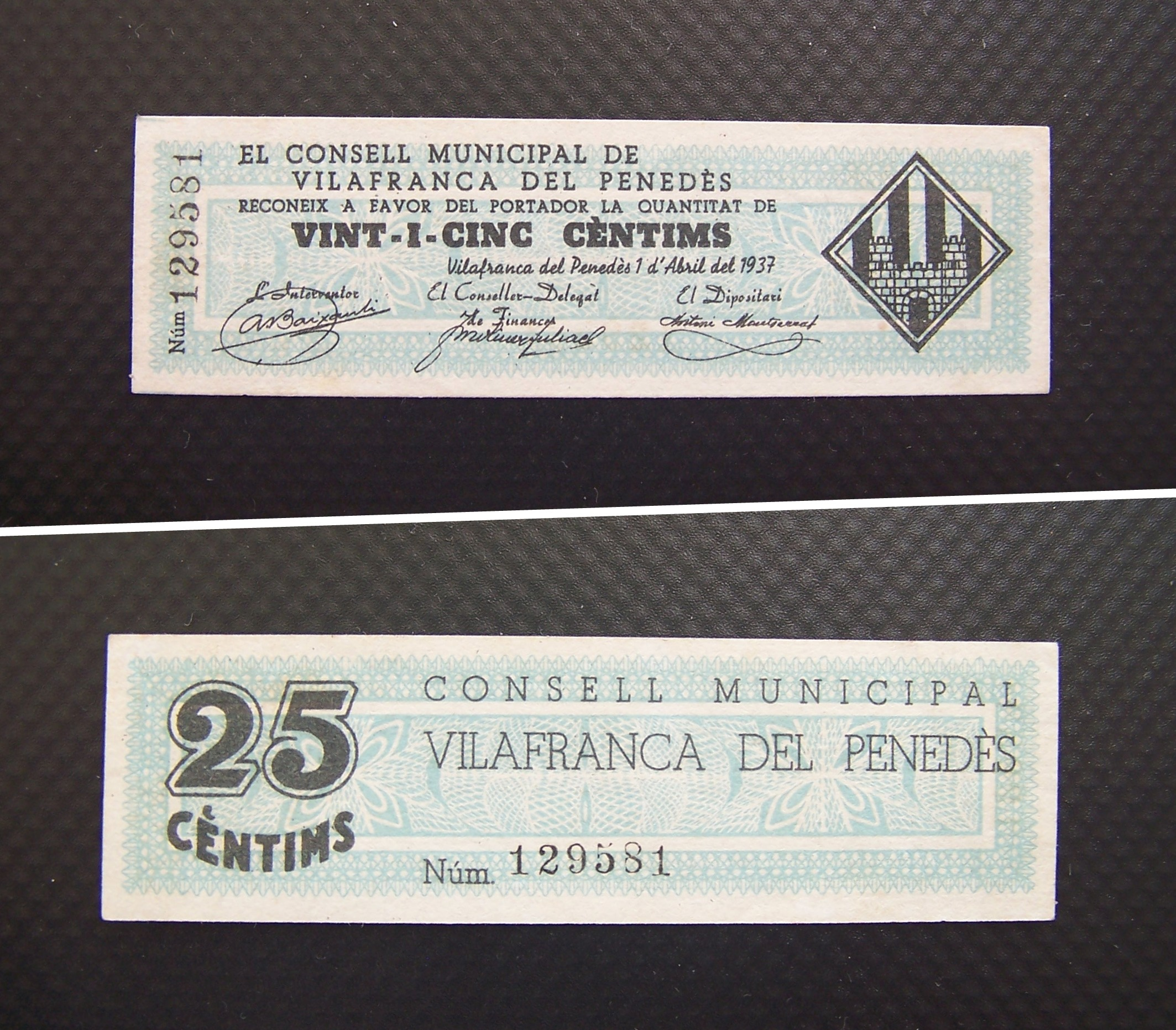 Billete local de la Segunda República Española, 25 céntimos, Vilafranca del Penedés, 1 abril 1937